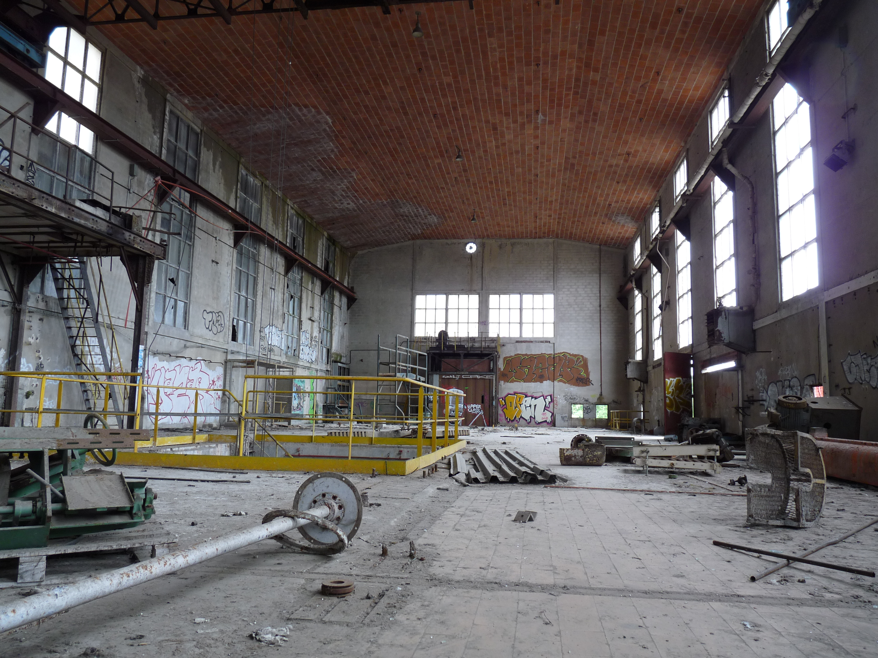 L'ancien atelier de fabrication du sulfate d'alumine, aujourd'hui démoli.